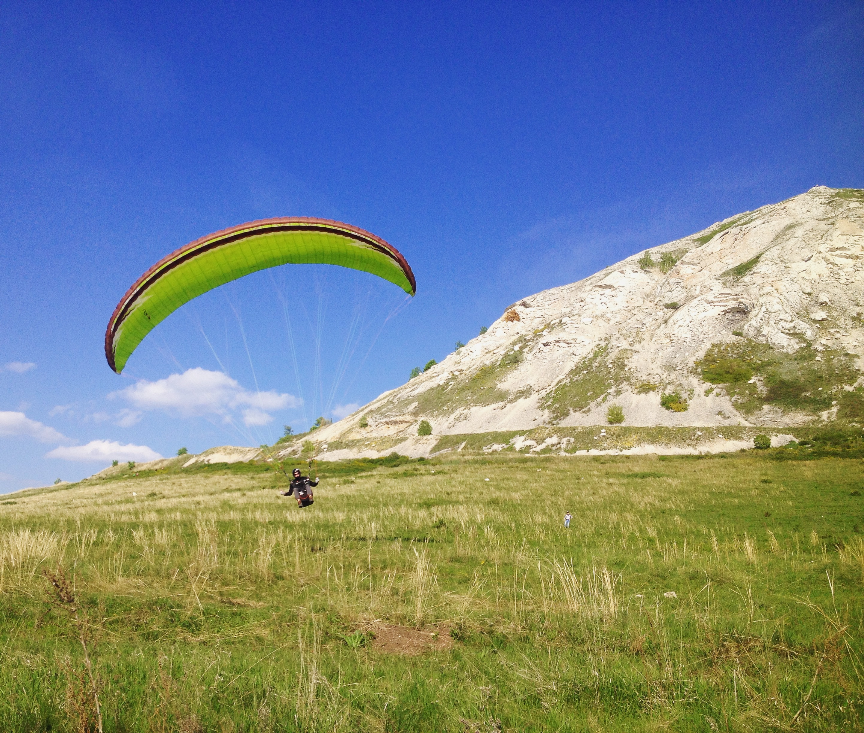 Гора Тра-тау: Ишимбайский район, Башкортостан This image is related to the protected area of Russia number 0210153